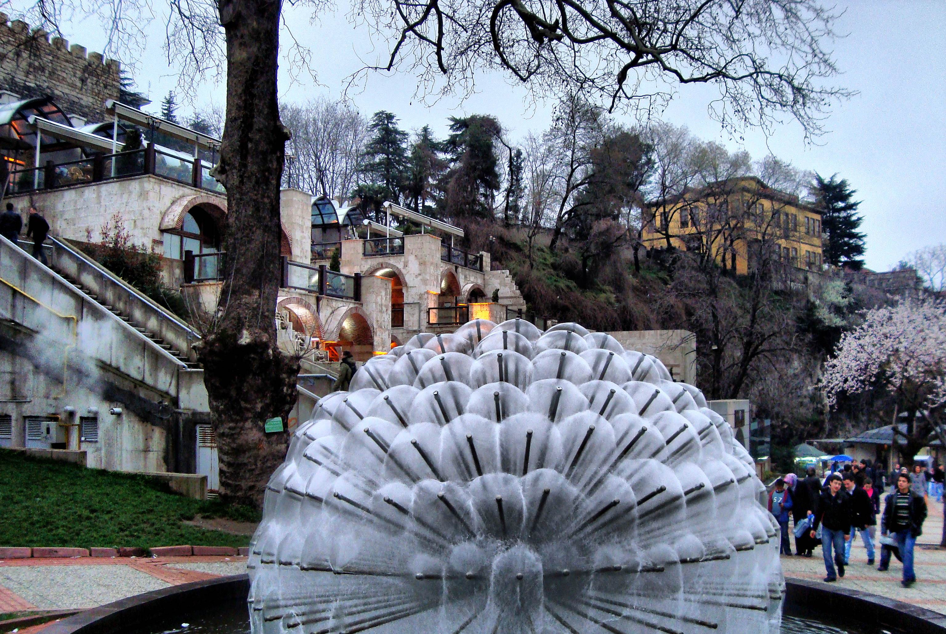 Balibey han-Bursa